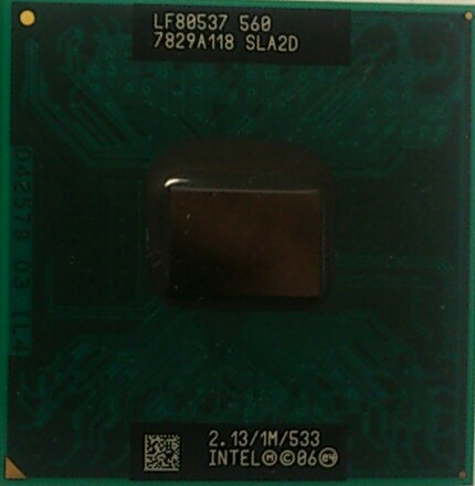 初代Core2世代のCeleron